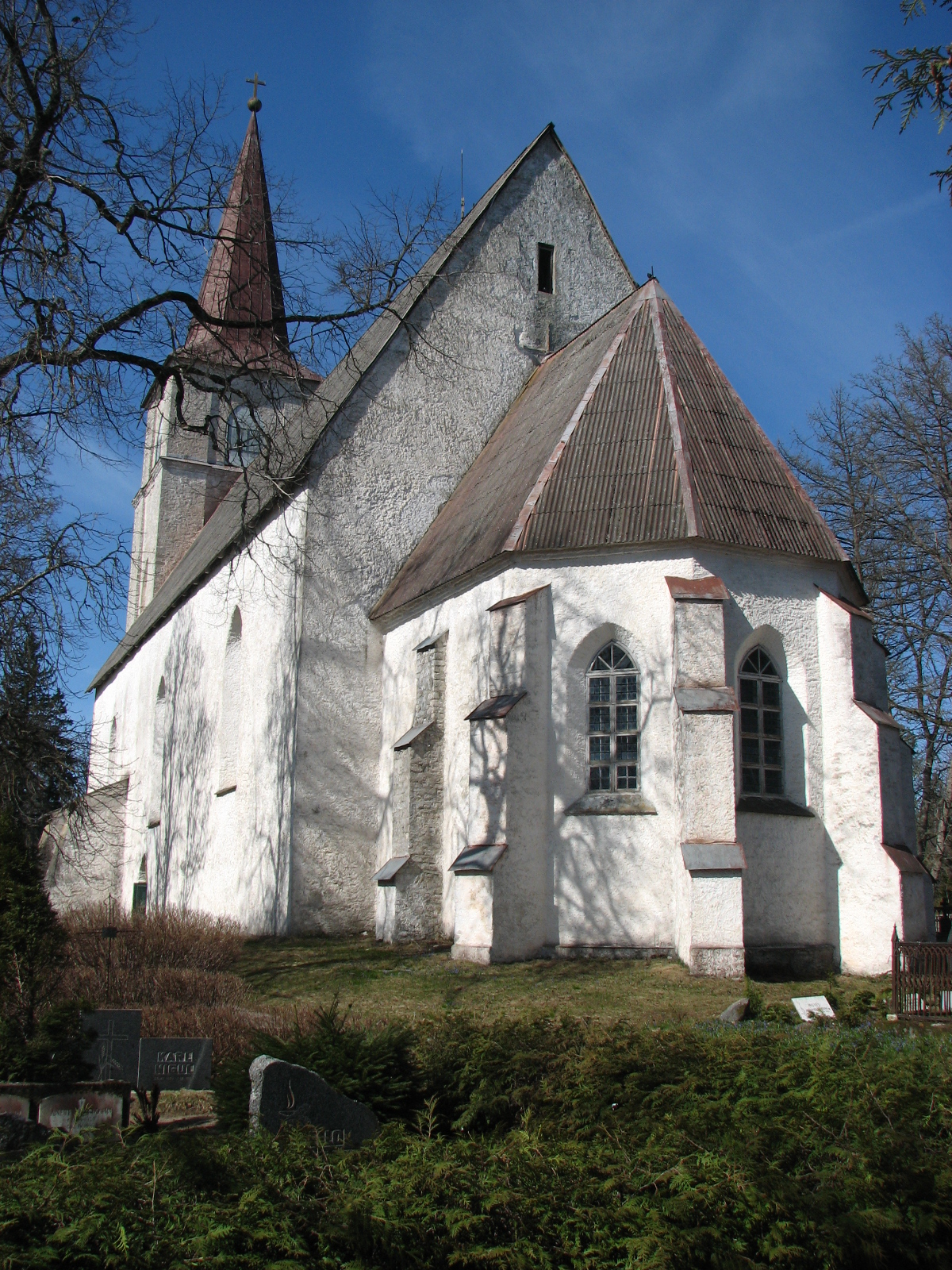 Vaade Kullamaa kirikule idakaarest